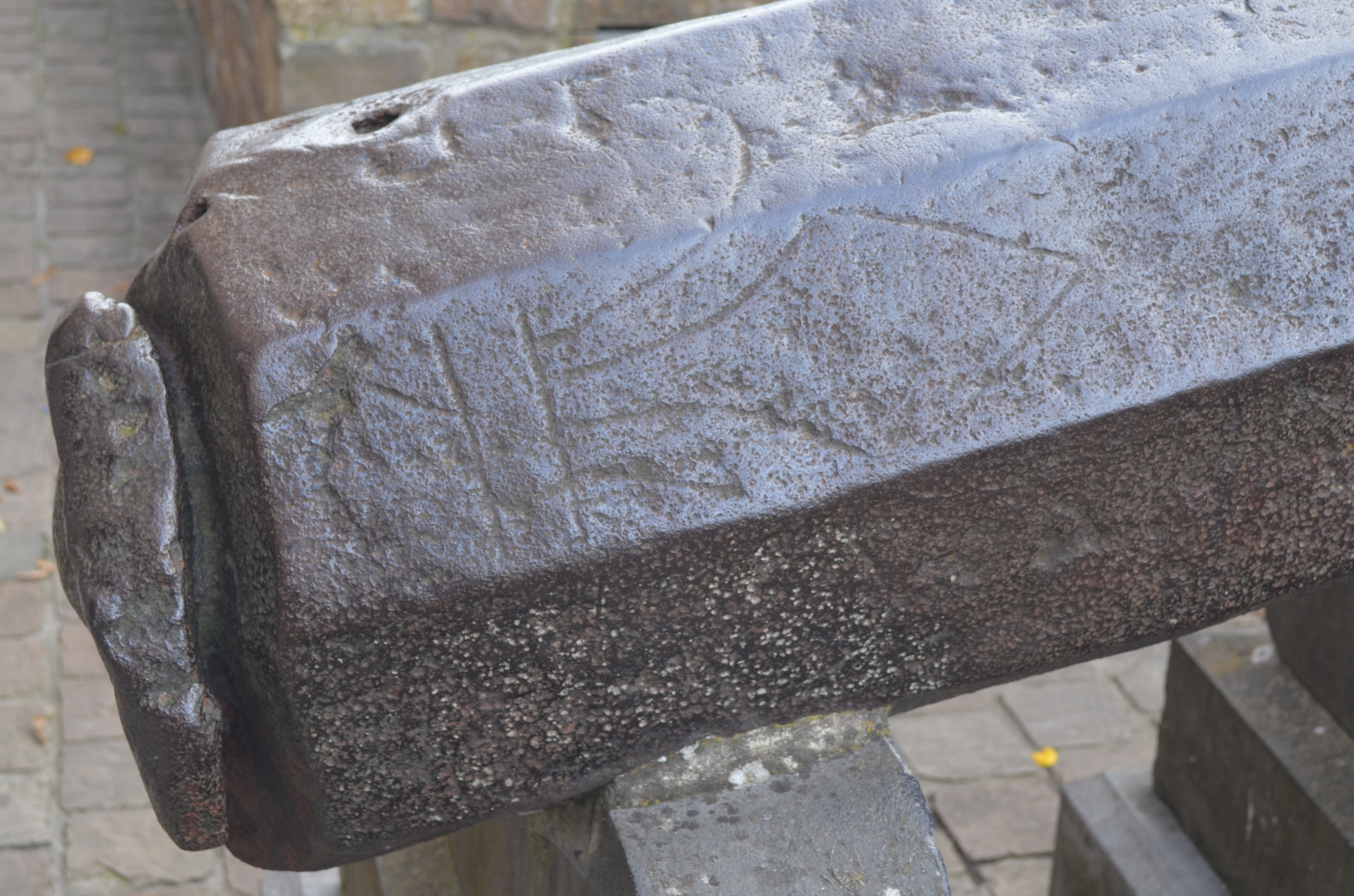 Thuin (Belgique) - Le Spantôle, canon en fer forgé encloué par les Thudiniens ou abandonné par les Bourguignons lors du sac de la ville en 1466.